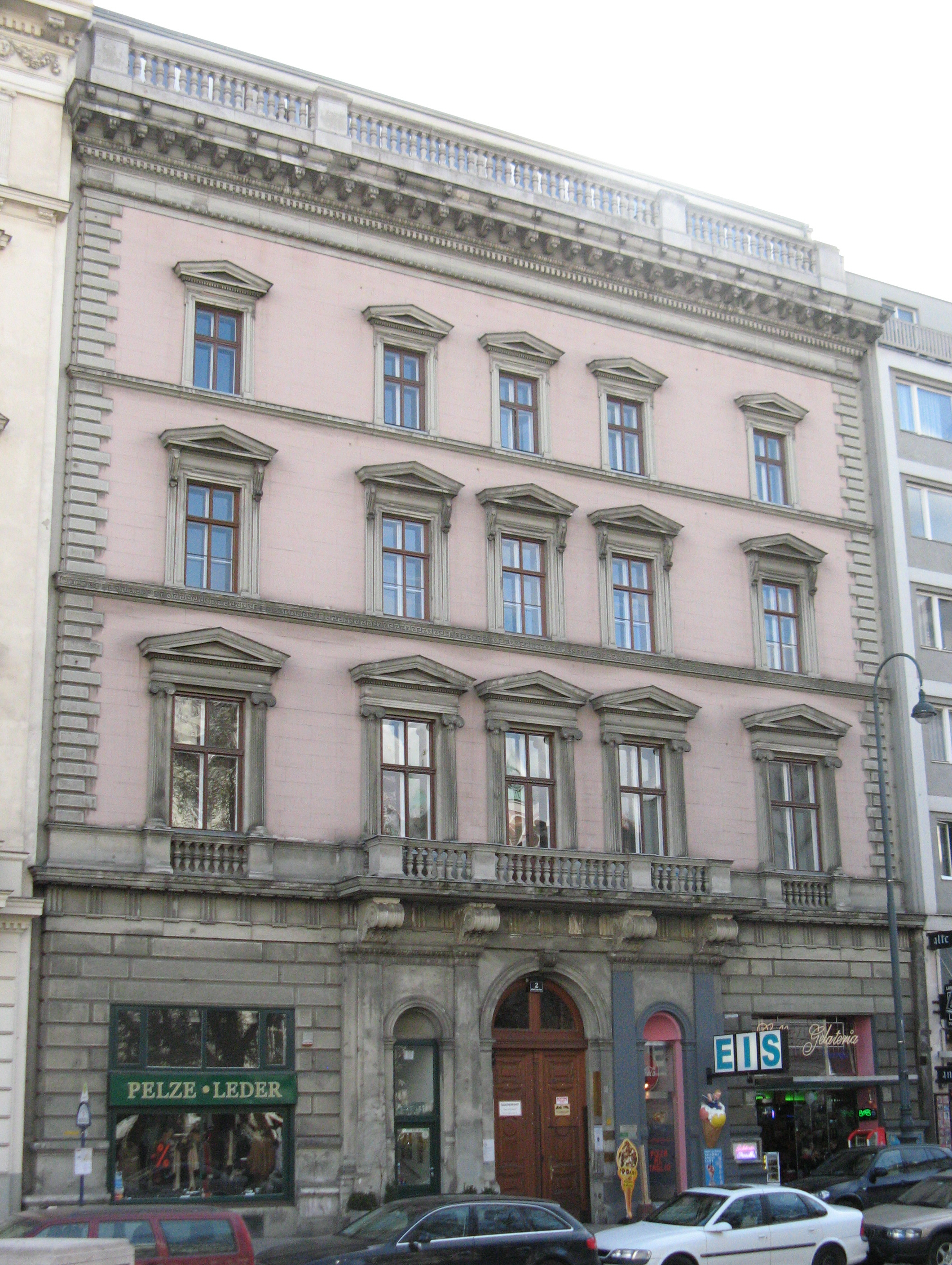 Klein-Palais (1867) von Carl Tietz, Dr.-Karl-Lueger-Platz, Wien-Innere Stadt Dr.-Karl Lueger-Platz 2 Pelze Leder Nuler